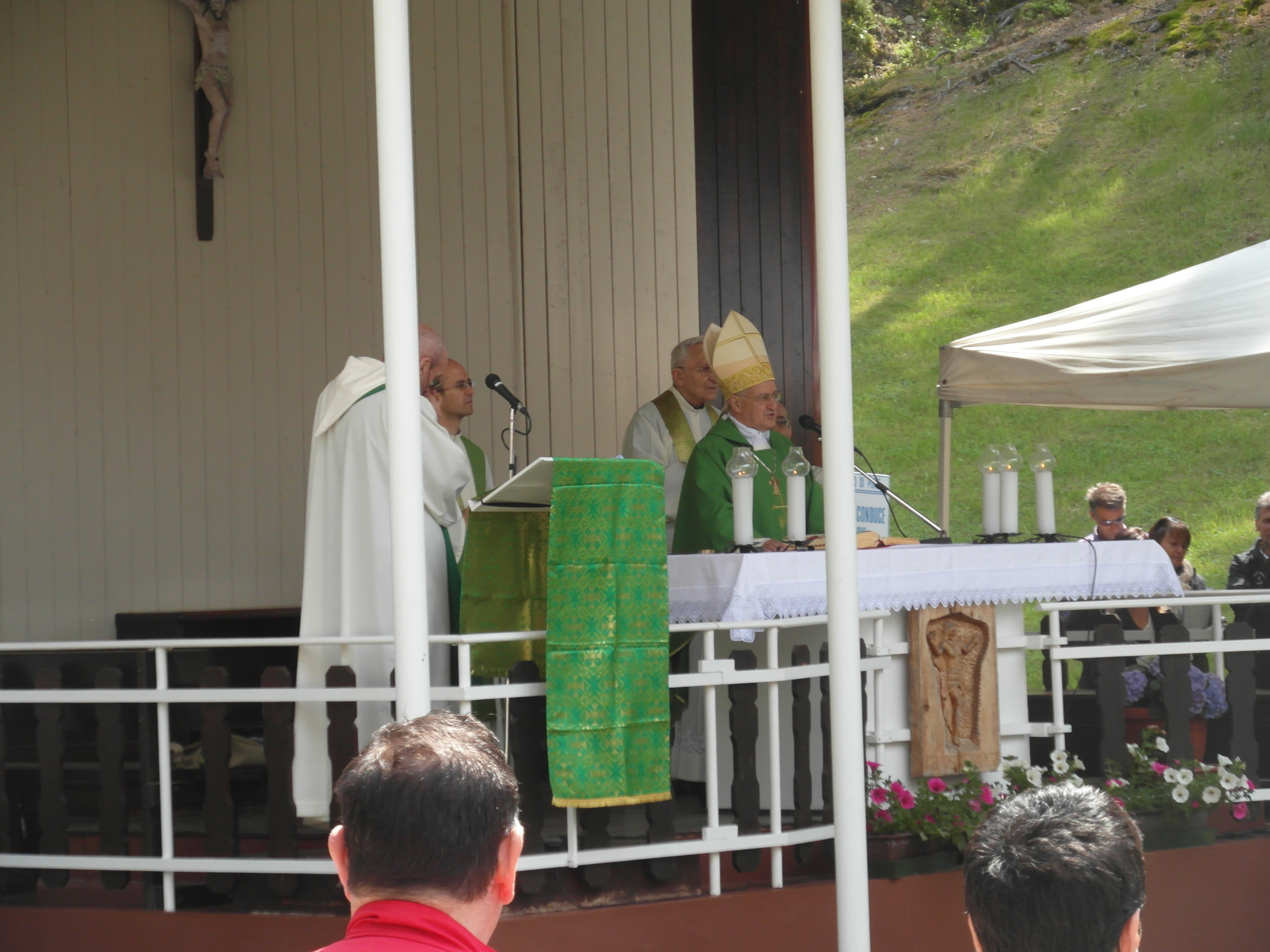 Santa Messa - Santuario delle Comparse